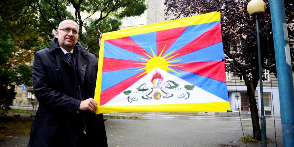 Nad Masarykovou univerzitou vlaje tibetská vlajka